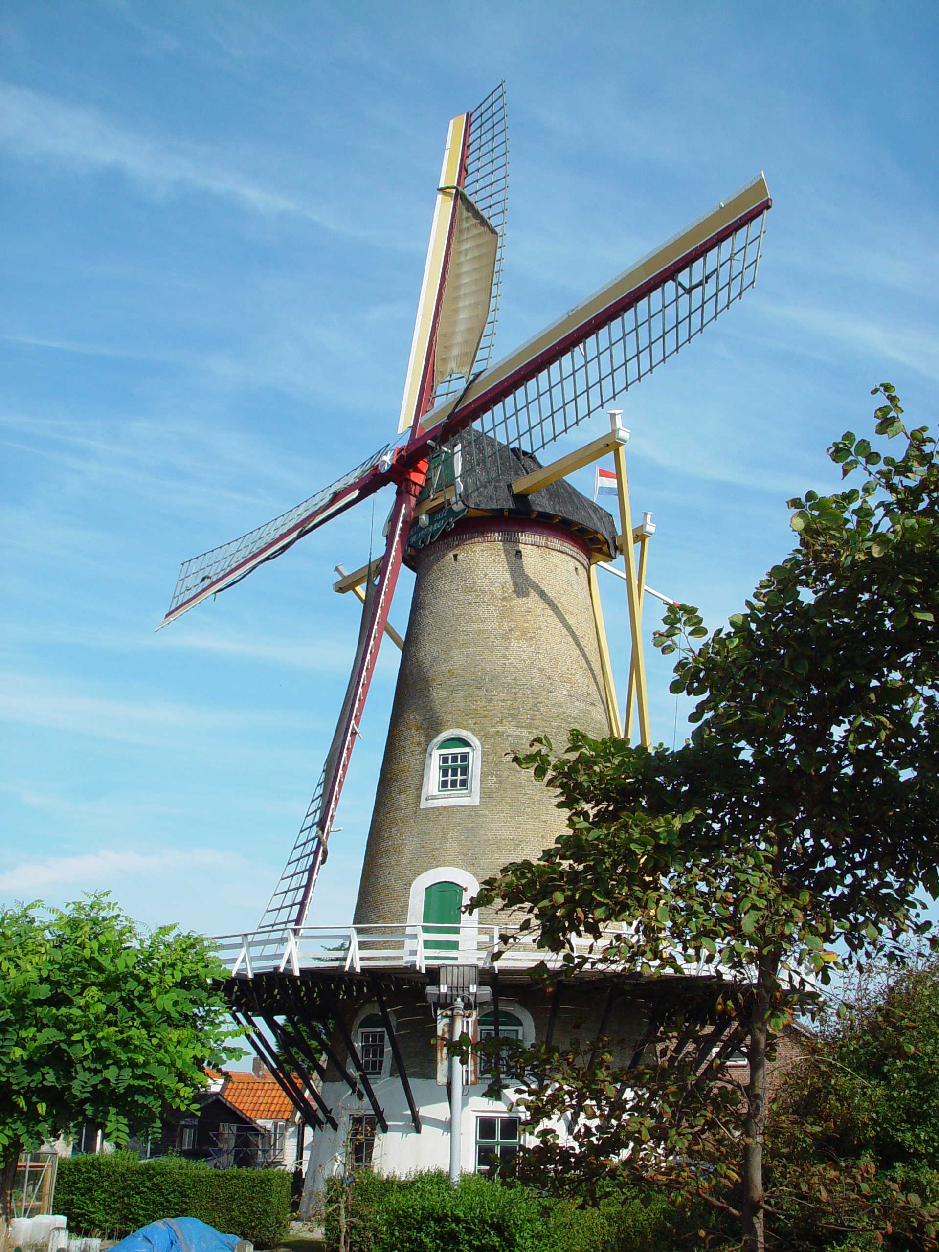 De Noorman, Westkapelle - Zeeuws Molenmuseum